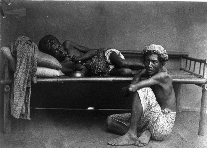 Foto. Een opium kit op Java.